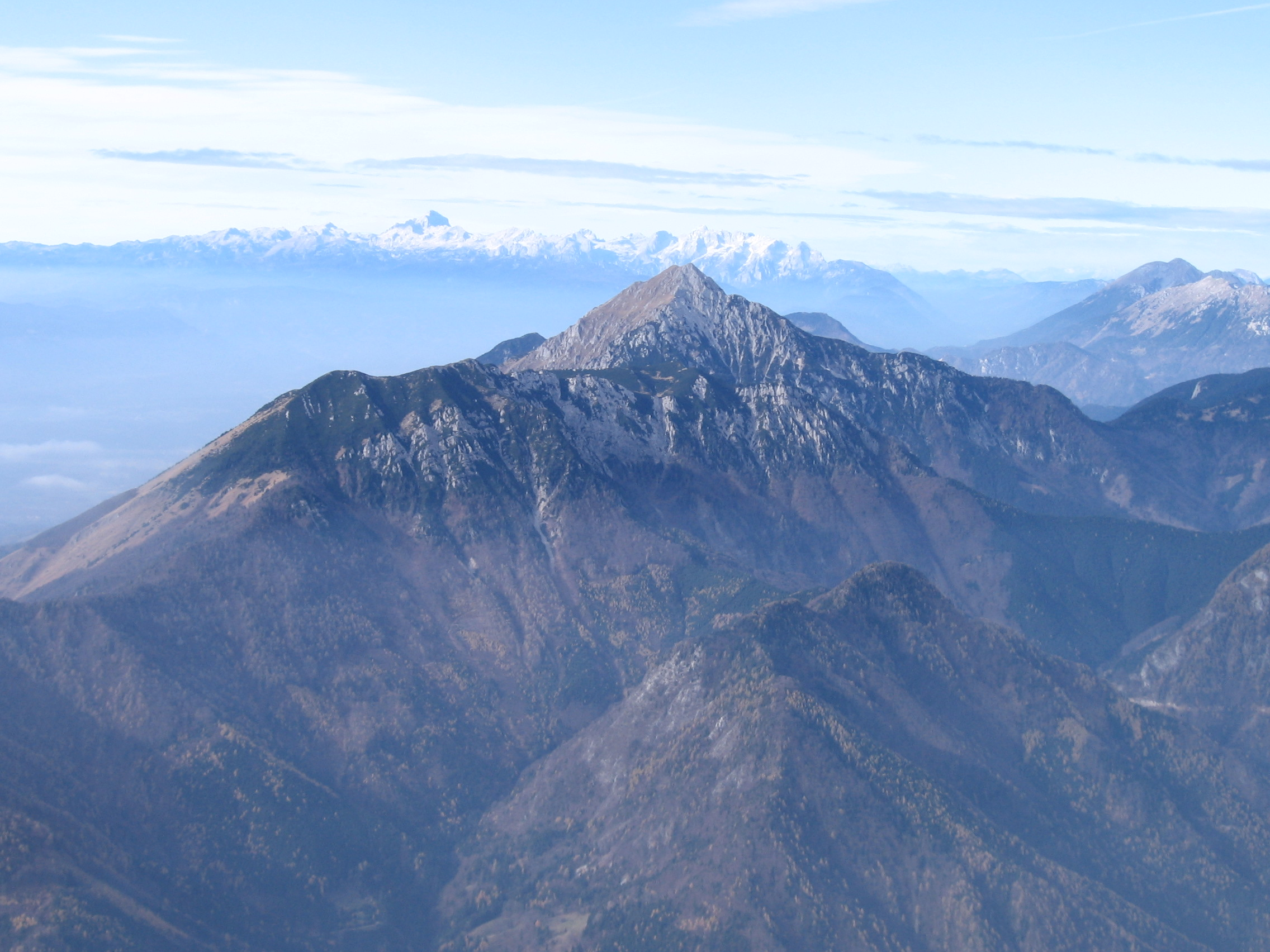 Mount Storžič in Kamnik Alps, from Kalški greben (east)